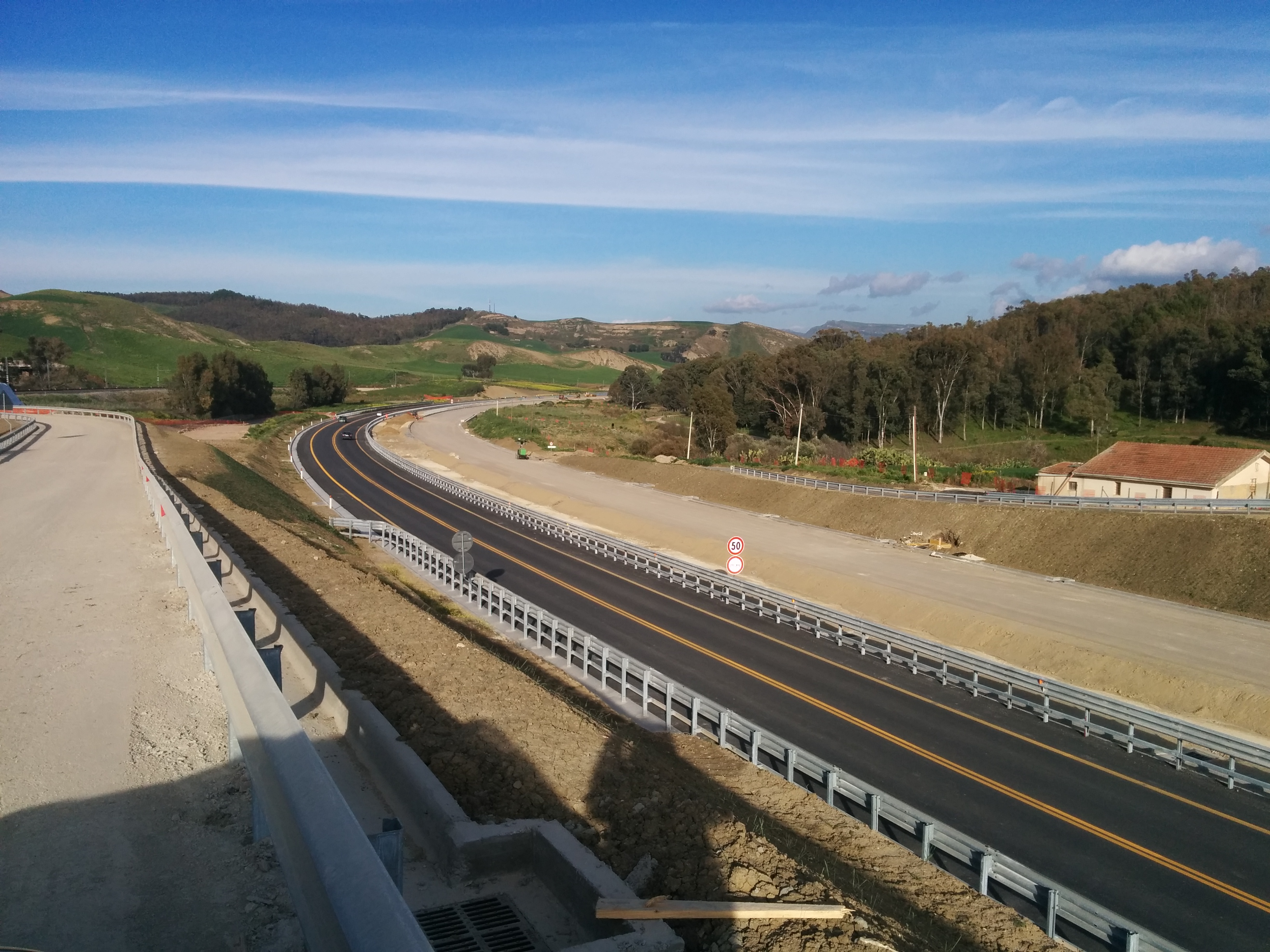 Tratto della strada statale 640 “degli Scrittori” in località Arenella durante i lavori di raddoppio nel marzo 2016.